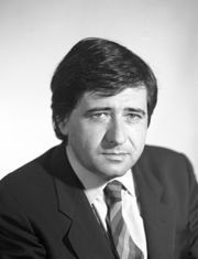 politico italiano